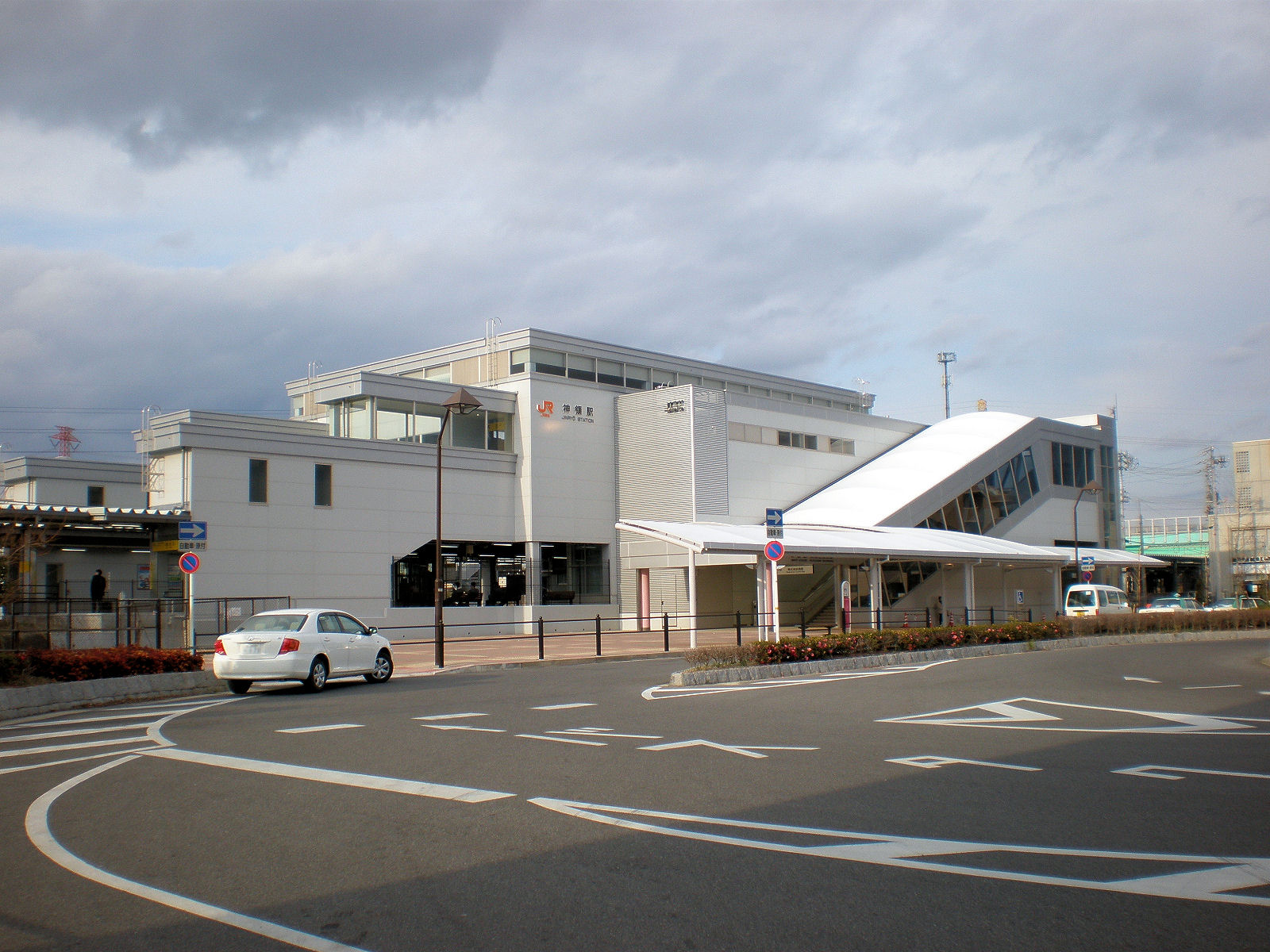 愛知県春日井市にある神領駅南口